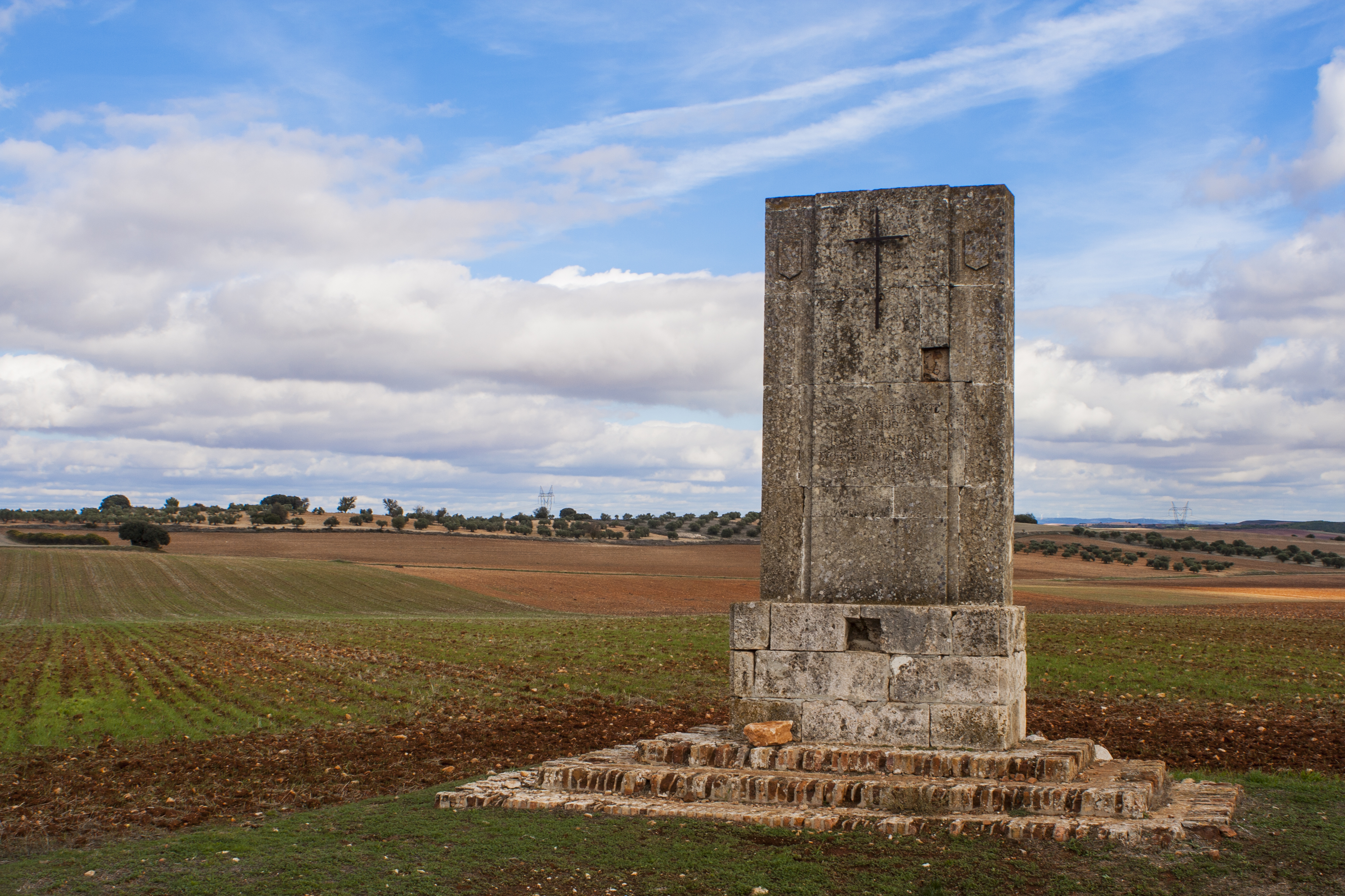 Cruz de Jorge Manrique en Castillo de Garcimuñoz CUENCA